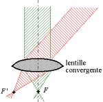 Focalisation de faisceaux parallèles par une lentille. Le principe de la focalisation par une lentille est utilisé notamment dans les lunettes astronomiques. On retrouve la notion de foyer secondaire image (cf. Image:Lentille foyer secondaire.png).